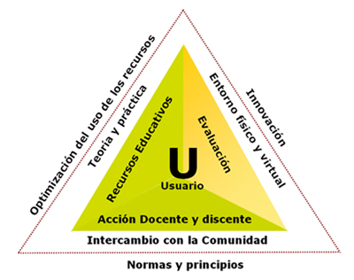 Este cuadro presenta el modelo educativo de la Escuela Nacional de la Judicatura de la República Dominicana